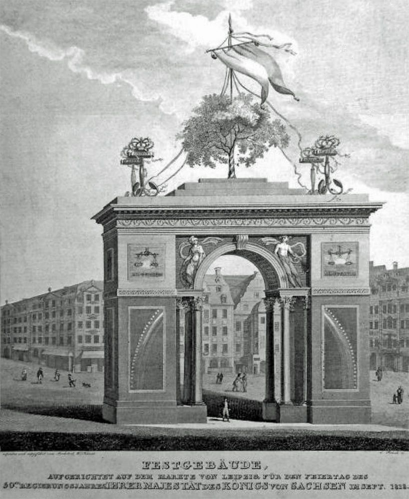 Festgebäude aufgerichtet auf dem Markte von Leipzig, für den Feiertag des 50st. Regierungsjahres Ihrer Majestät des Königs von Sachsen im Sept. 1818